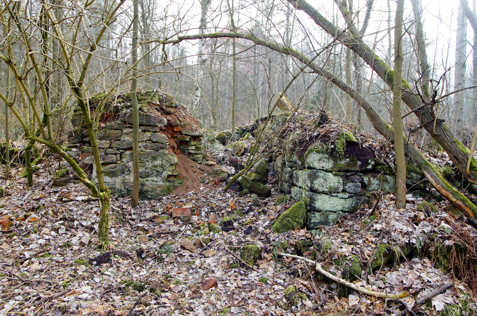 Staré Sedlo, okres Sokolov, pozůstatky minerálního závodu Svaté Trojice; více